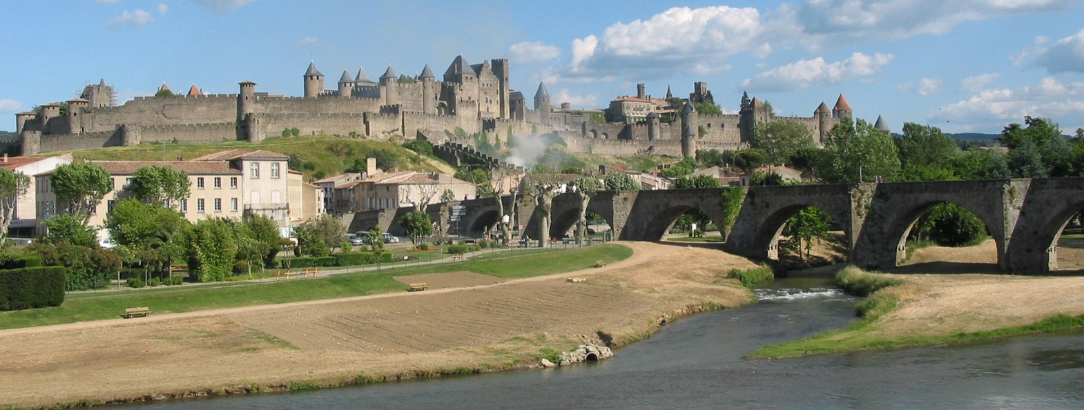 Carcassonne vun dem Dall vun der Aude aus gesinn. Quell: Commons vum Jean-Pol GRANDMONT e bësse geschnidden. Kategorie:Gemengen am Departement Aude